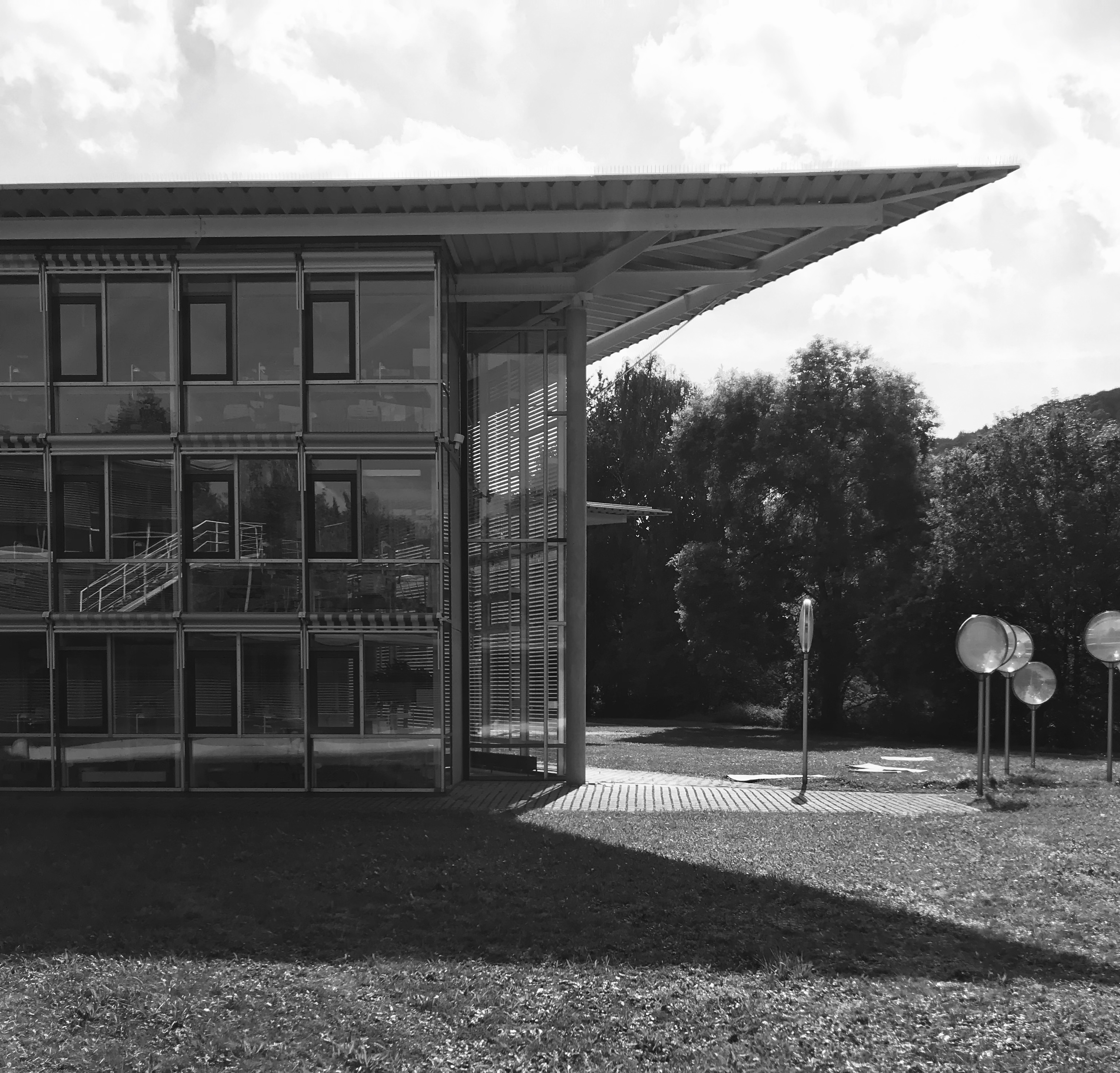 Zentralbibliothek